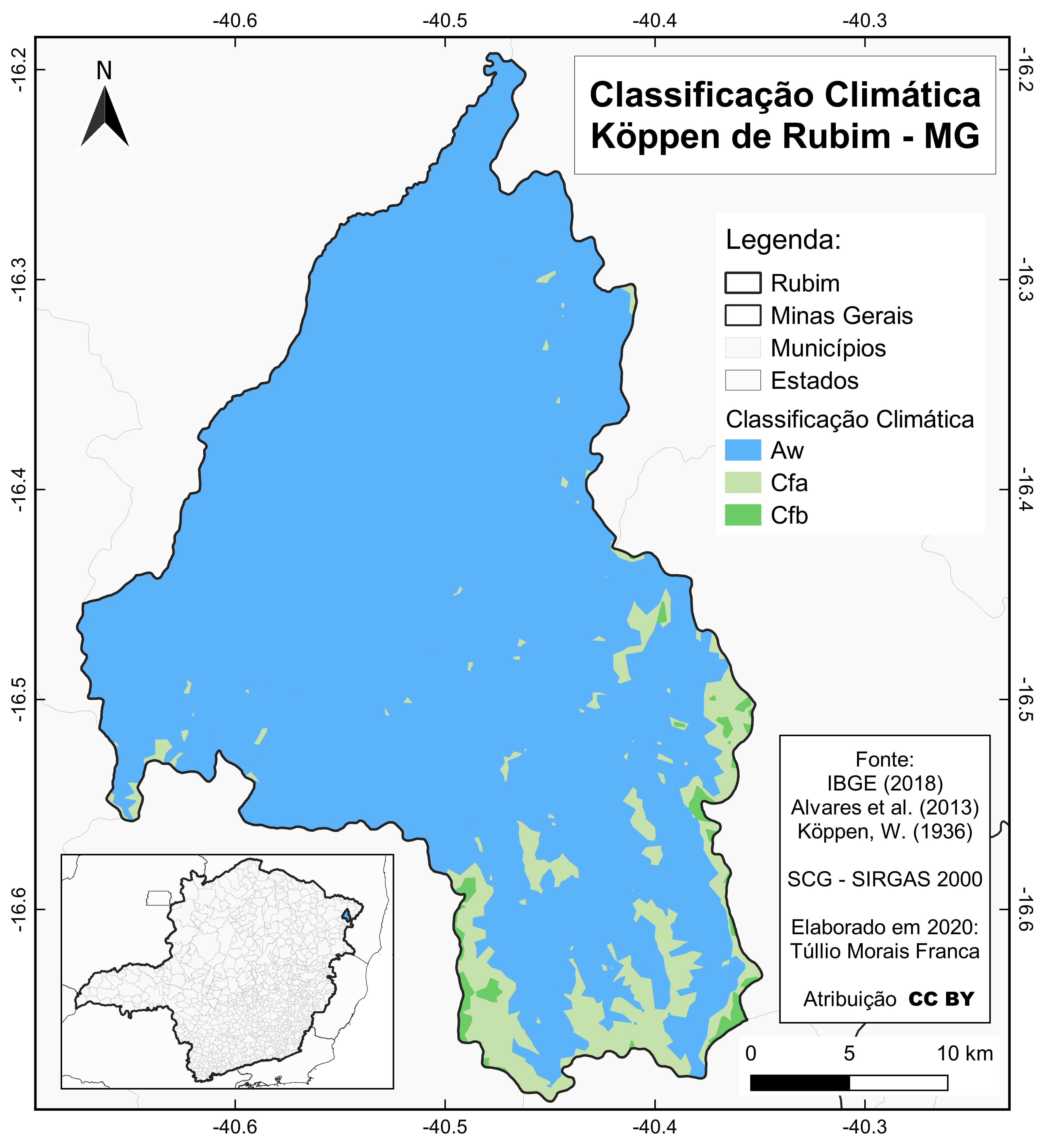 Mapa da Classificação Climática Köppen do município de Rubim-MG